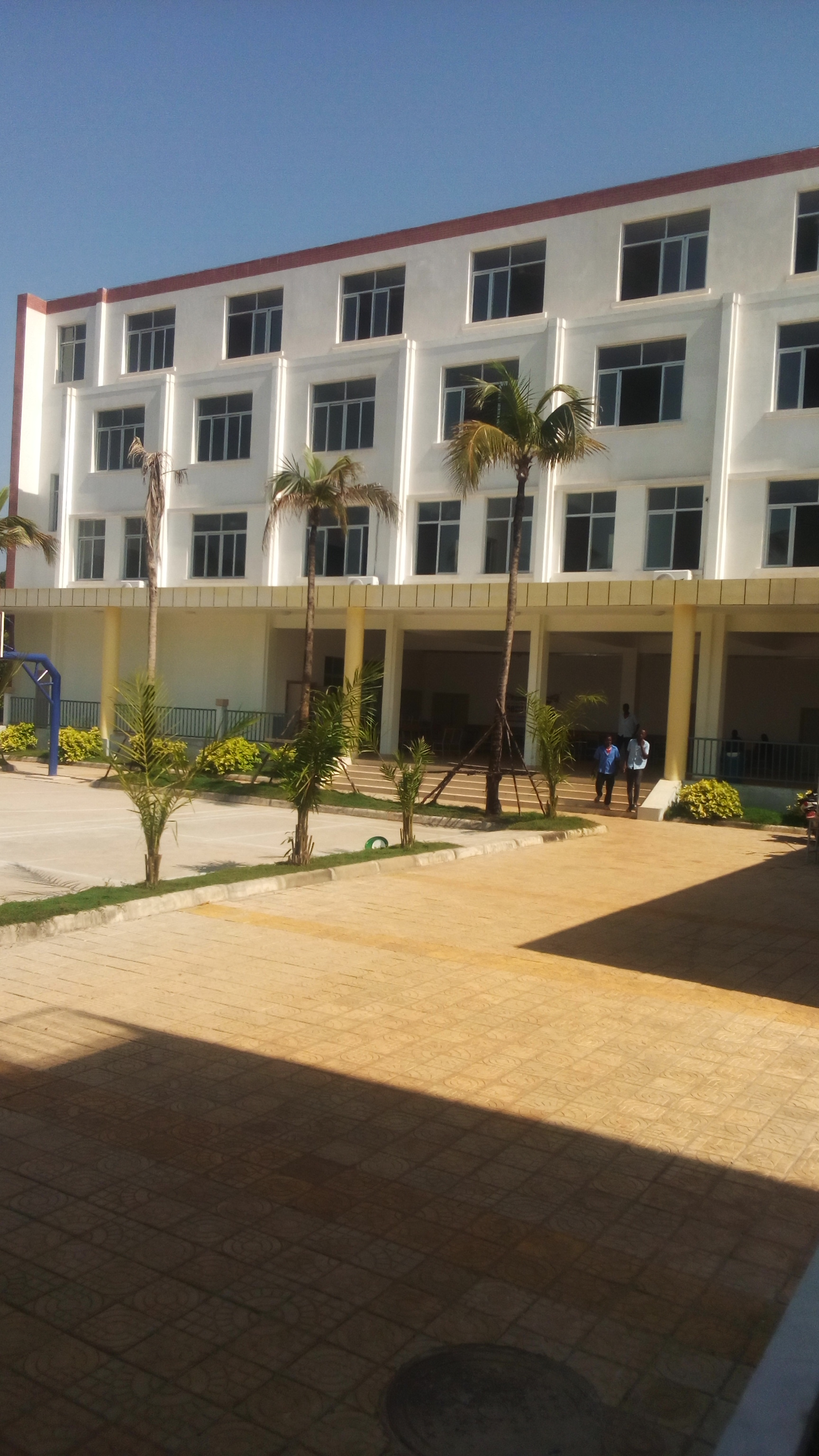 Ecole nationale des postes et télécommunications (ENPT) à Kipé (Guinée) This is an image with the theme "Africa on the Move or Transport" from: Guinea